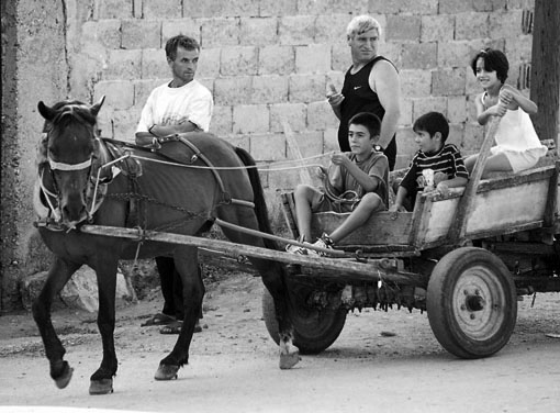 Косово и Метохија: Због небезбедног одласка до удаљених бензинских пумби у албанска насеља, Срби и неалбанци принуђени су да користе коњске запрге.Фотографије из пројекта "Корени душе". Фото:Дарко Дозет